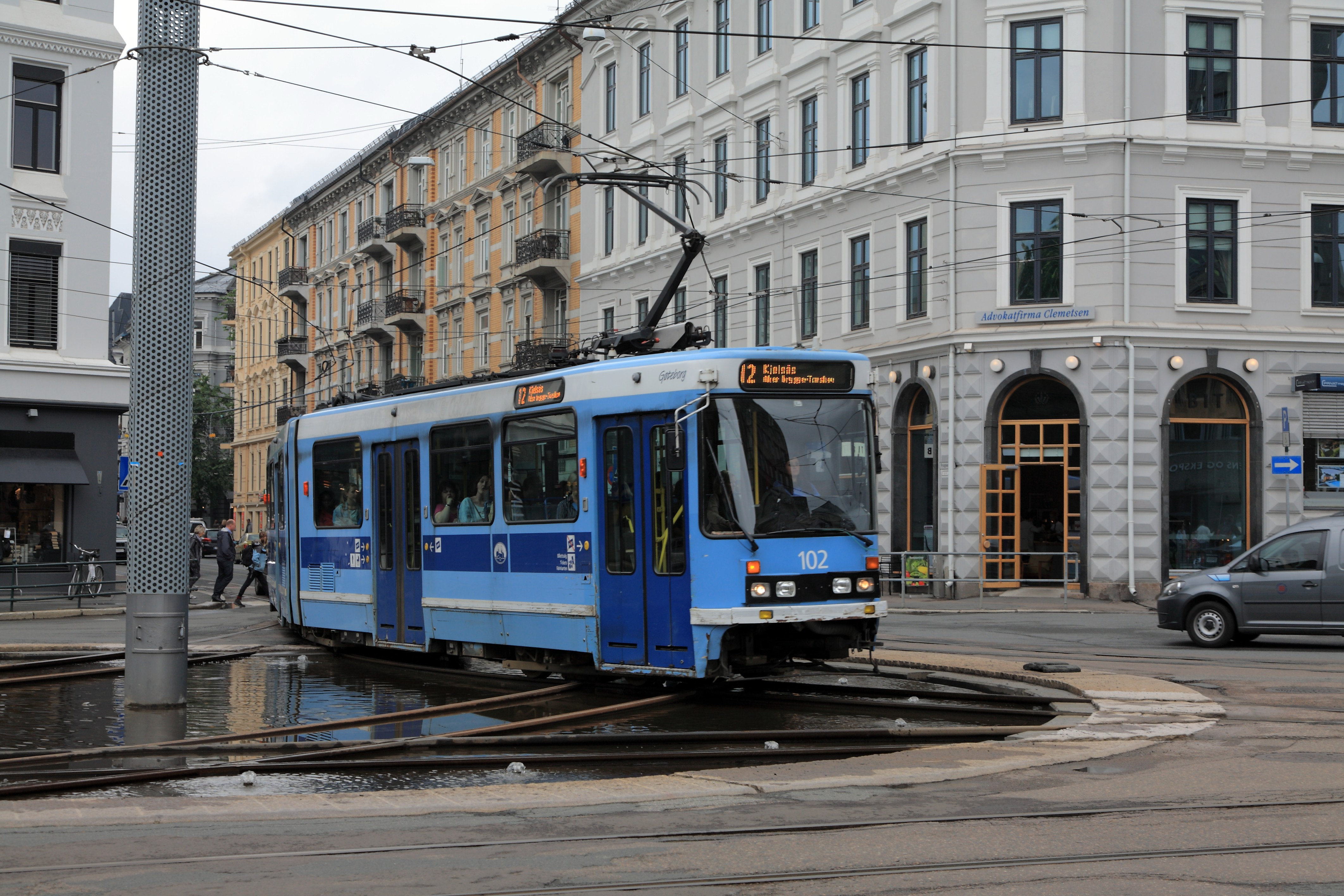 Gelenktriebwagen Reihe SL79 auf der Linie 12 nach Kjelsås bei der Fahrt durch das Brunnenbecken auf dem Solli plass.